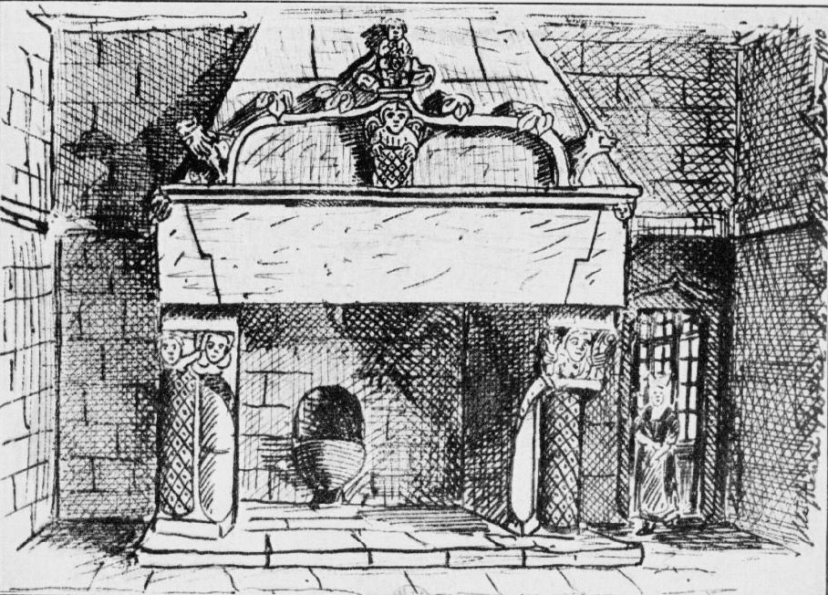 Manoir de Mézarnou : la grande cheminée en 1905 (dessin, J. Baudry,La Fontenelle le ligueur et le brigandage en Basse-Bretagne pendant la Ligue